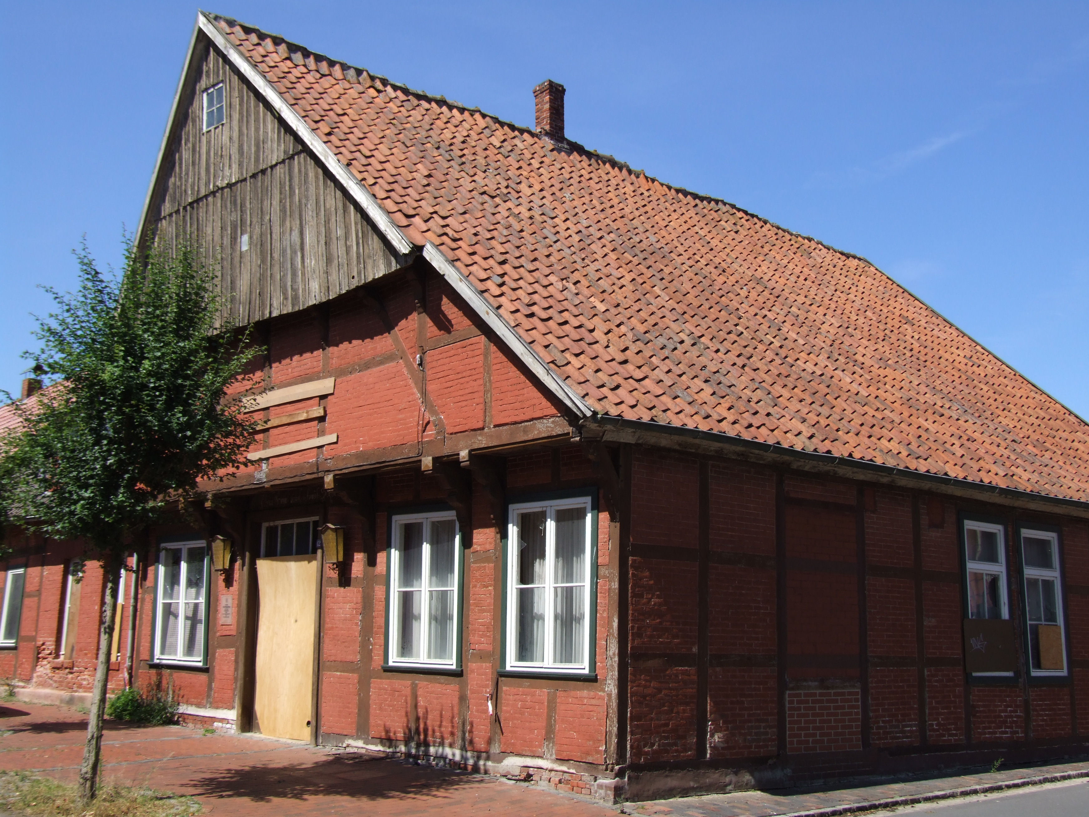 Quakenbrück, ehemaliges Ackerbürgerhaus von 1655, erbaut von Johan Heye